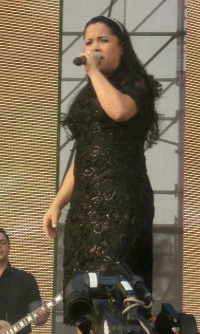 Cassiane